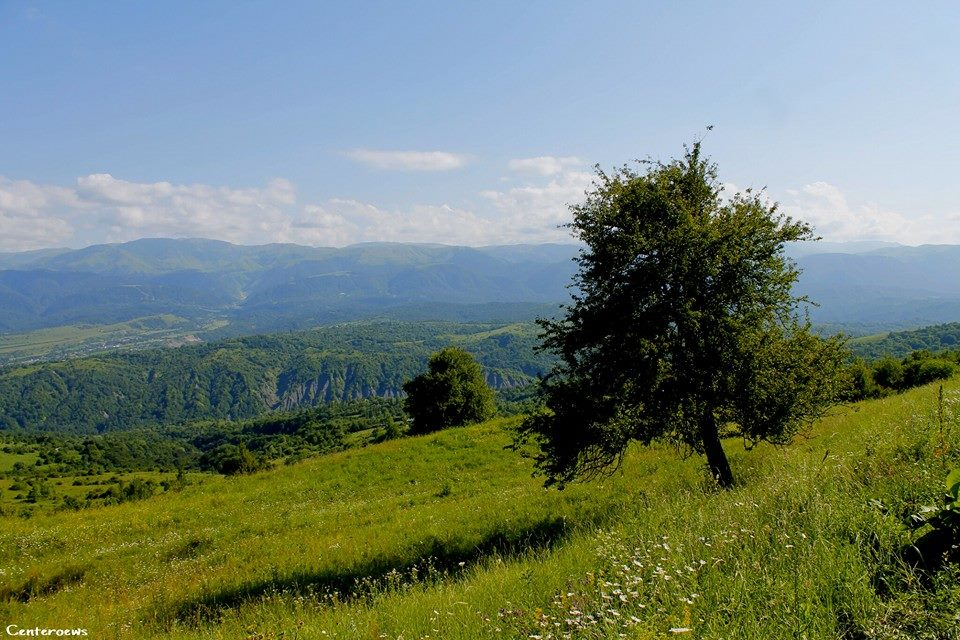 Окрестности Центороя This file, which was originally posted to was reviewed on 11 December 2016 by reviewer INeverCry, who confirmed that it was available there under the stated license on that date.